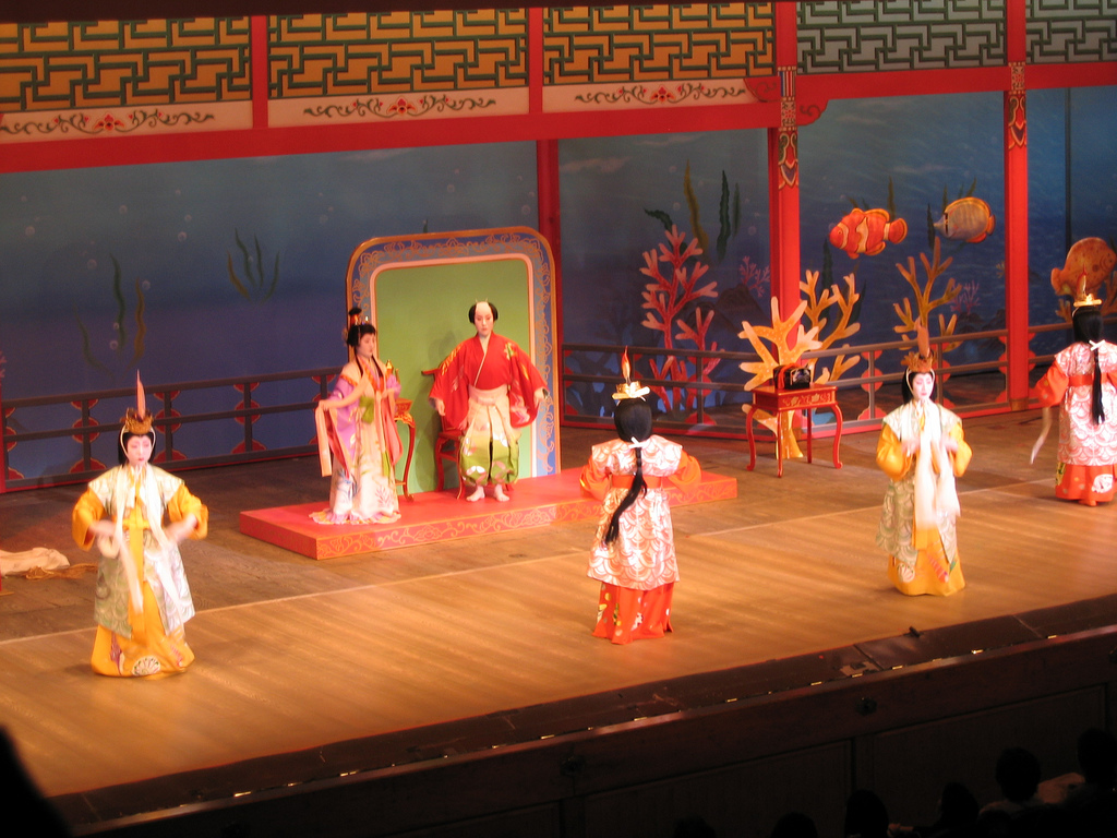 Miyako Odori（都をどり）